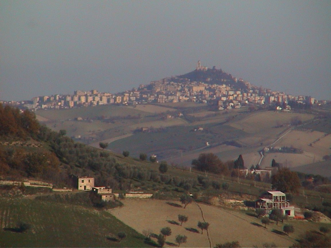 Fermo panorama da nord-ovest,lavoro personale, 27 dicembre 2003, Pietro Liberati